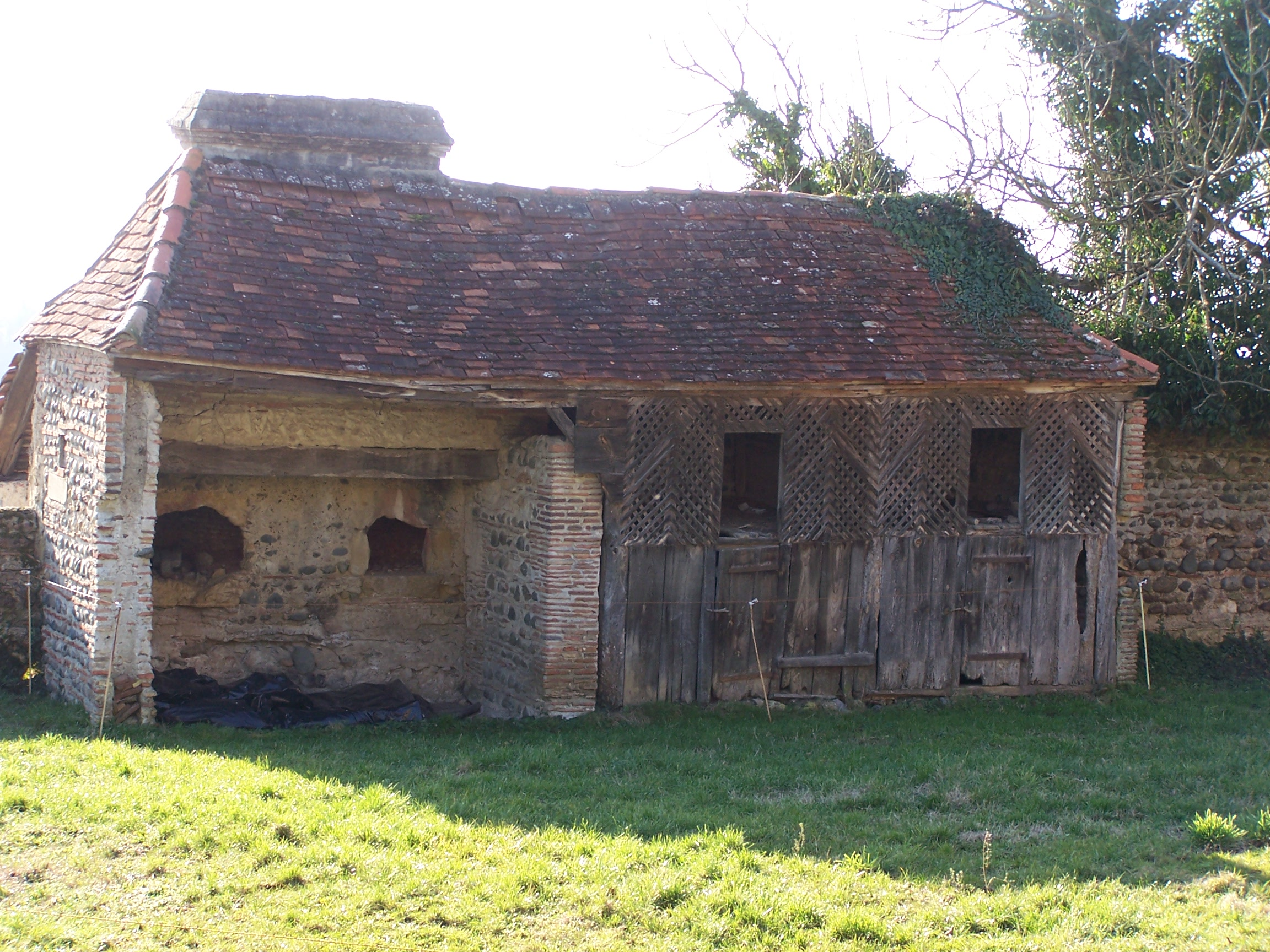 Urdès (communauté de communes de Lacq, Pyrénées-Atlantiques), four ancien. Old oven.